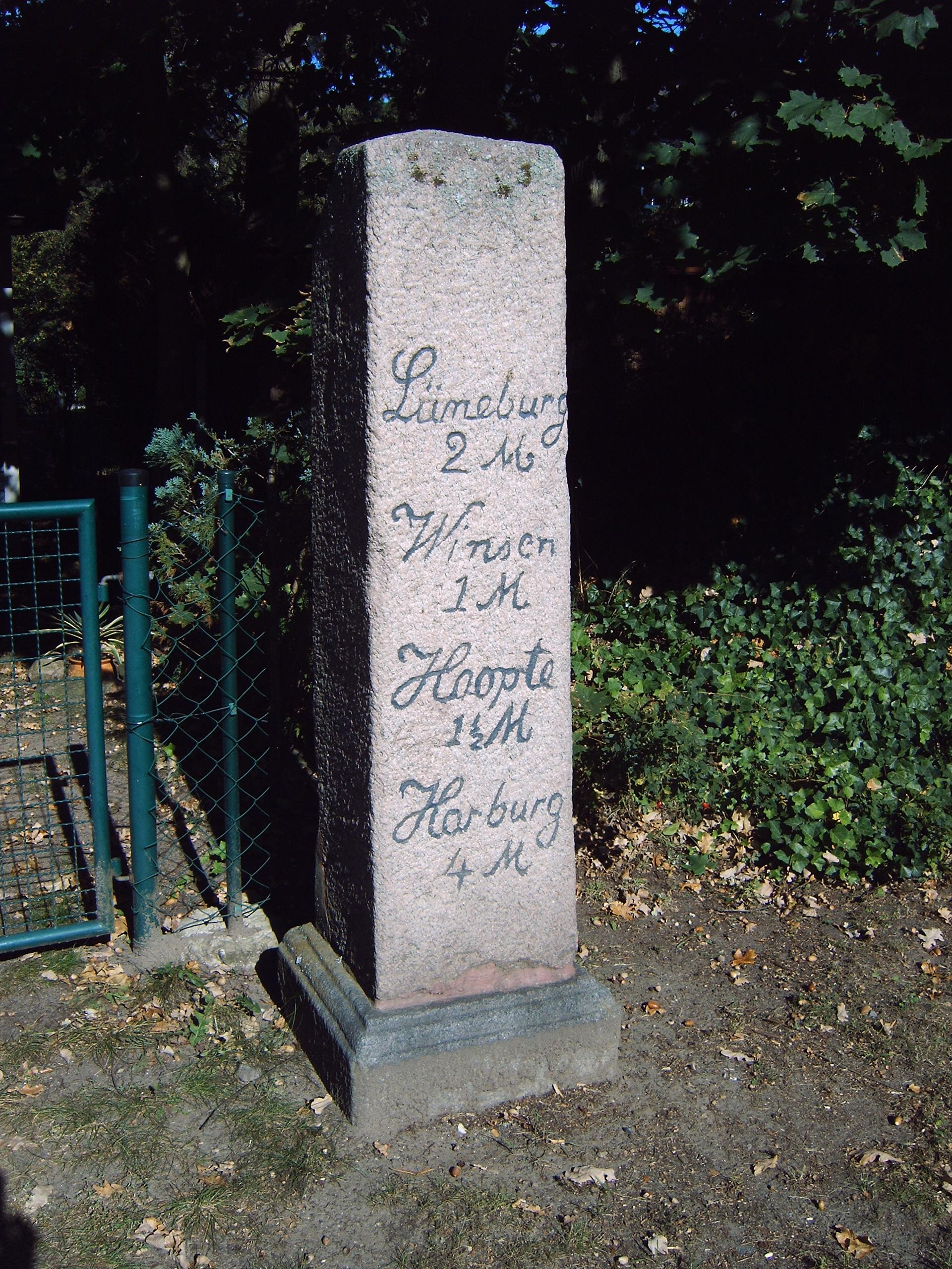 Ganzmeilensäule an der K 87 in Sangenstedt bei Winsen (Luhe)